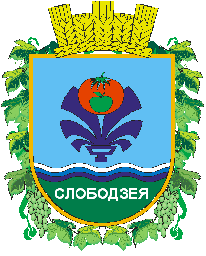 Герб города Слободзея (Приднестровье)